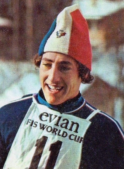 CAMPIONI dello SPORT 1973/74-Figurina n.339- DUVILLARD - FRANCIA